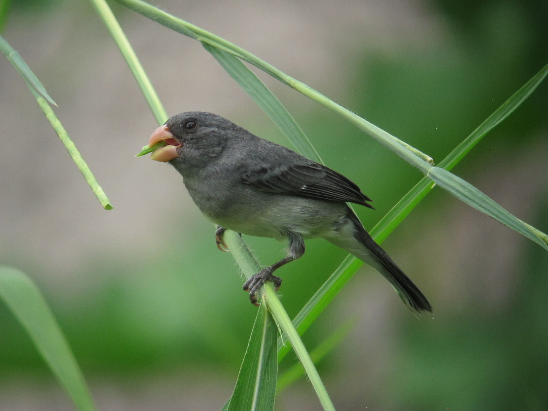 Puerto Carreño, Vichada, Colombia